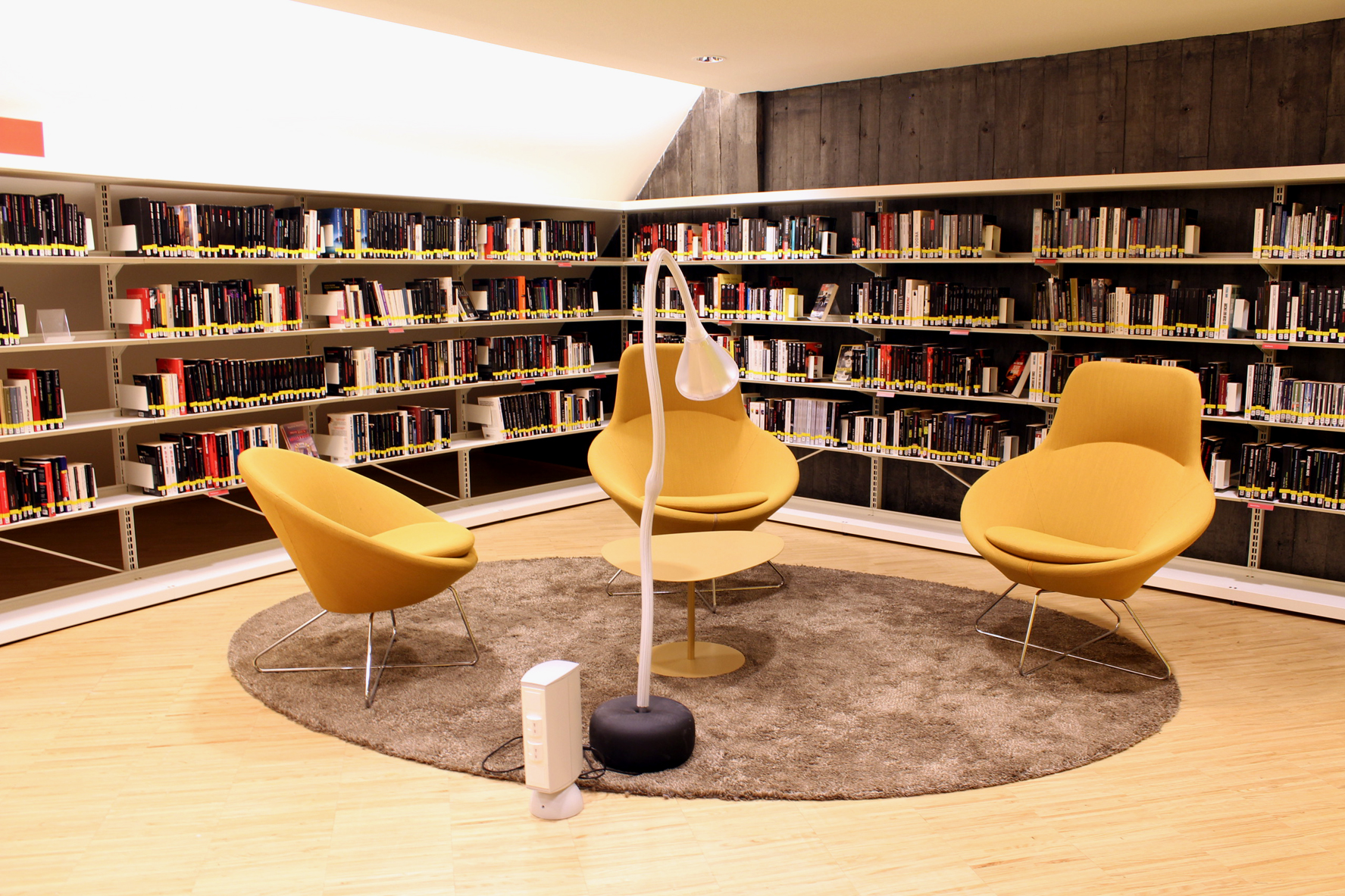 Intérieure de la bibliothèque du Havre.